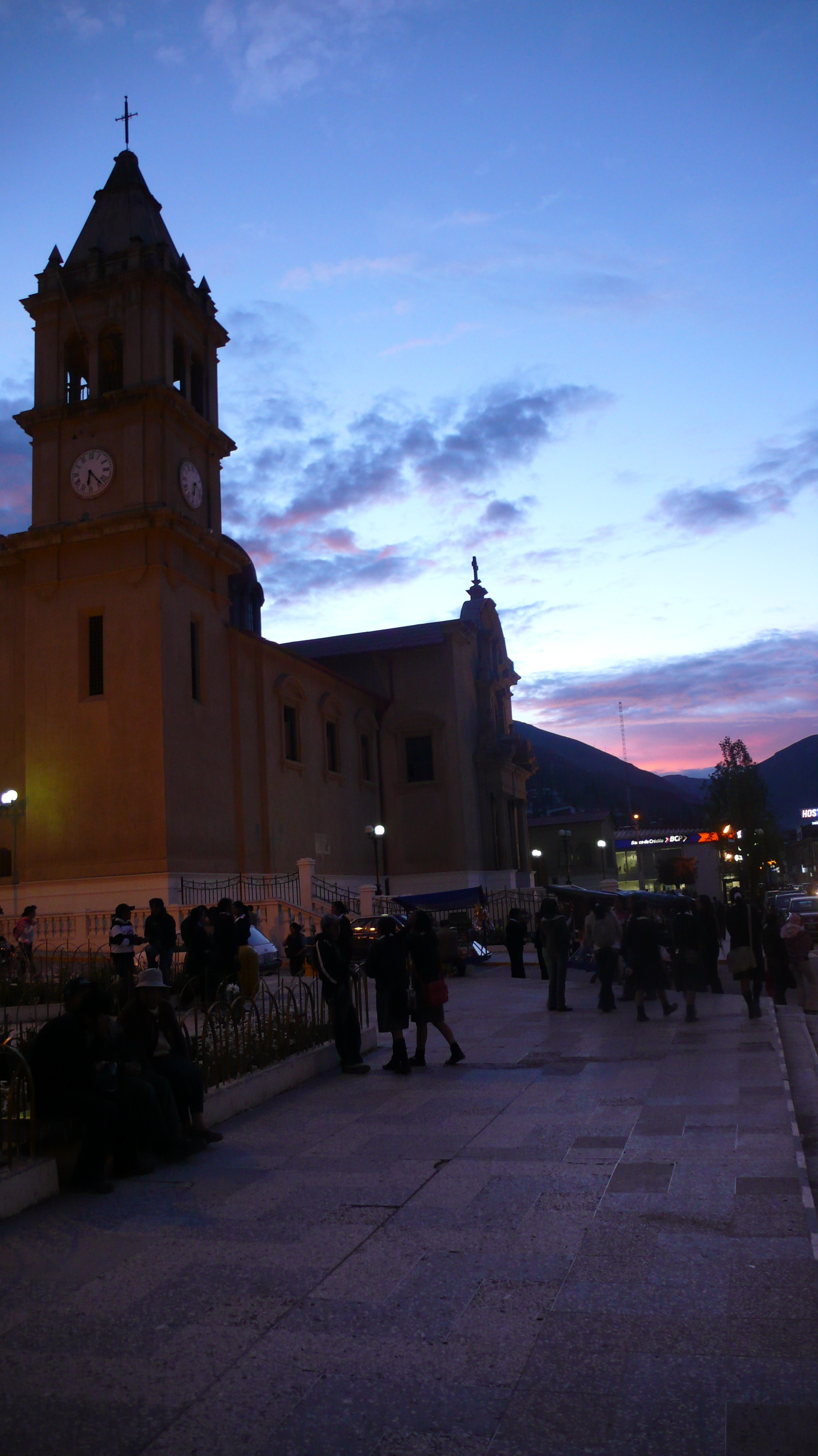 Catedral "Santa Ana" de Tarma (Vista lateral - atrio). Tarma, Junín, Perú.